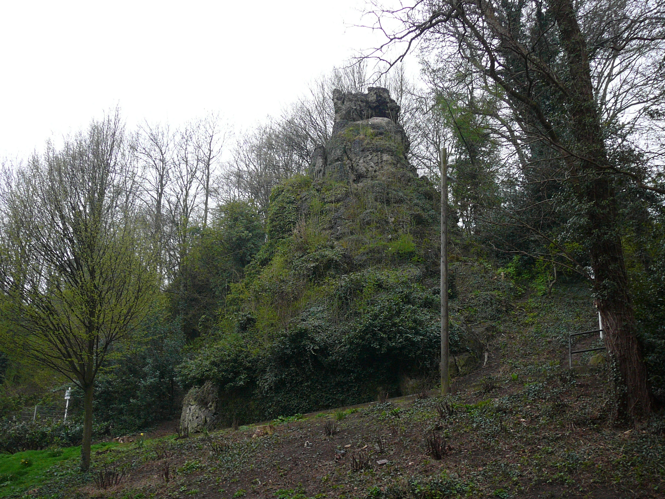 Bogenstraße, Wuppertal